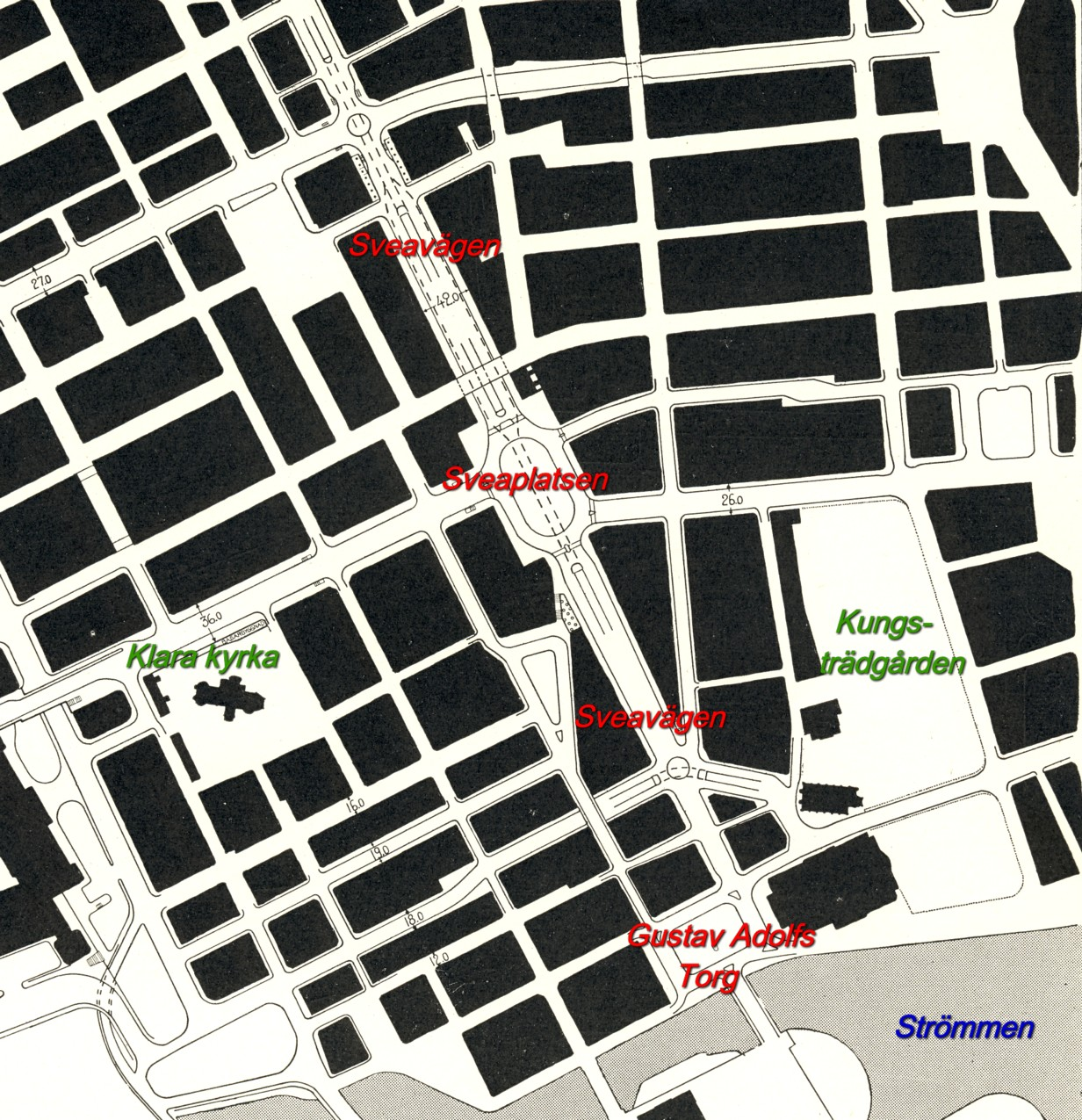 Cityplan för Stockholm 1940, förslag av Albert Lilienberg.